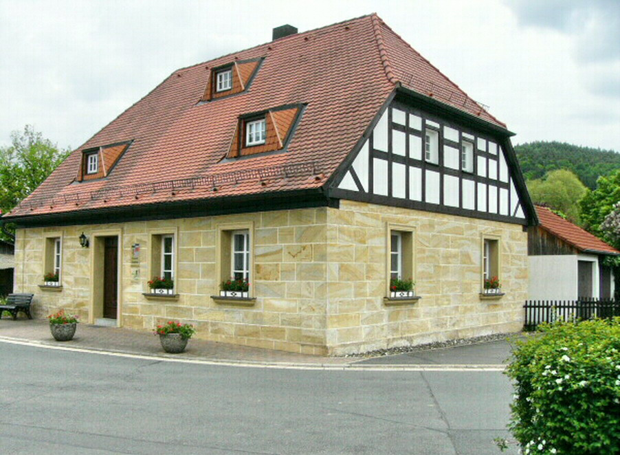 Gemeindehaus in Glashütten (Oberfranken)